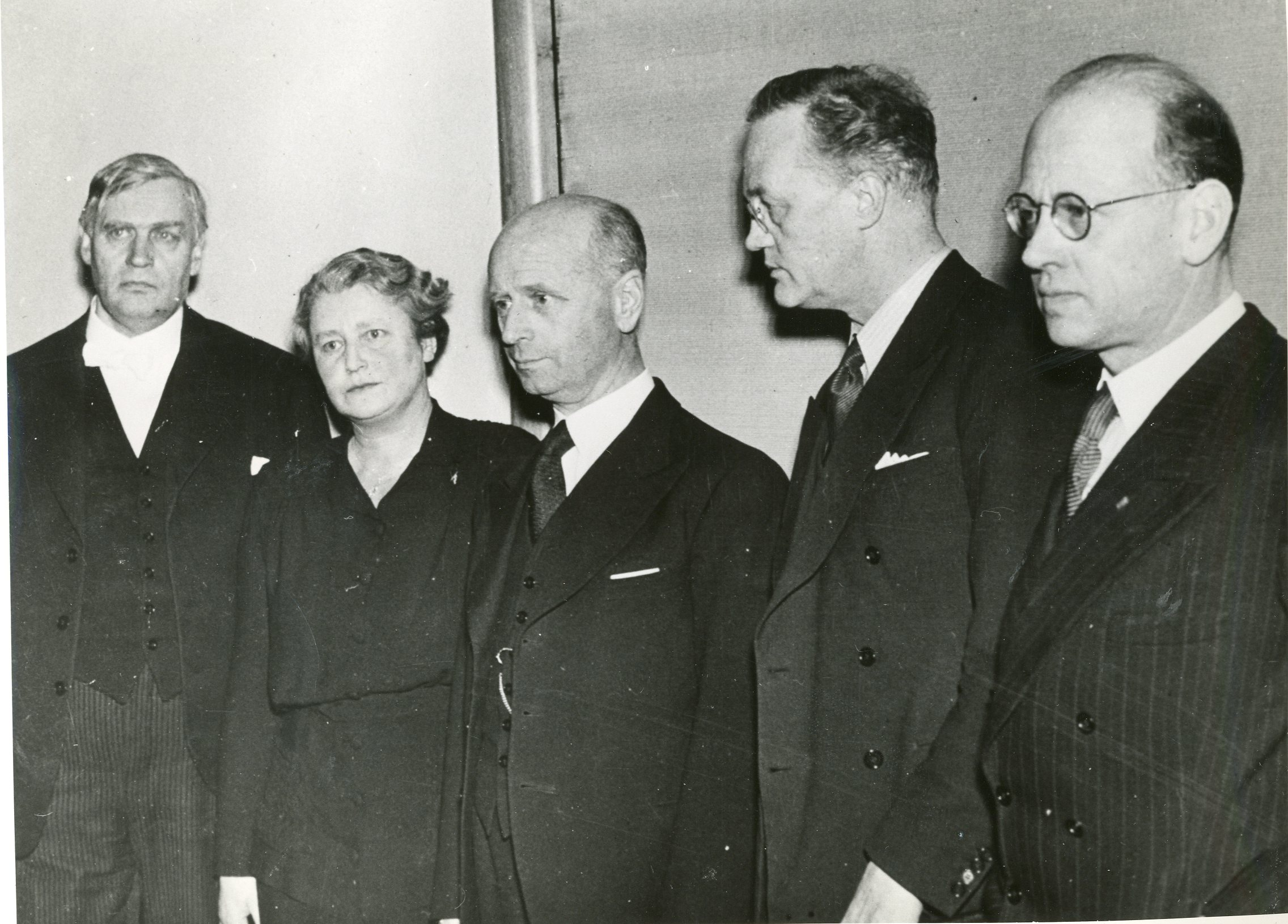 ”Minnefesten for Nordahl Grieg i Stockholm. Dette bilde er tatt under minnefesten for Nordahl Grieg i Medborgarhuset i Stockholm 9. februar 1944. Bildet viser fra venstre lärovärksadjunkt Carl Cederblad, Uppsala, fru Johanne Grieg Cederblad sammen med minister Bull, Sigurd Hoel og teatersjef Hans Jacob Nielsen.” RA/PA-1209/Uc/66/3/Uten nummer